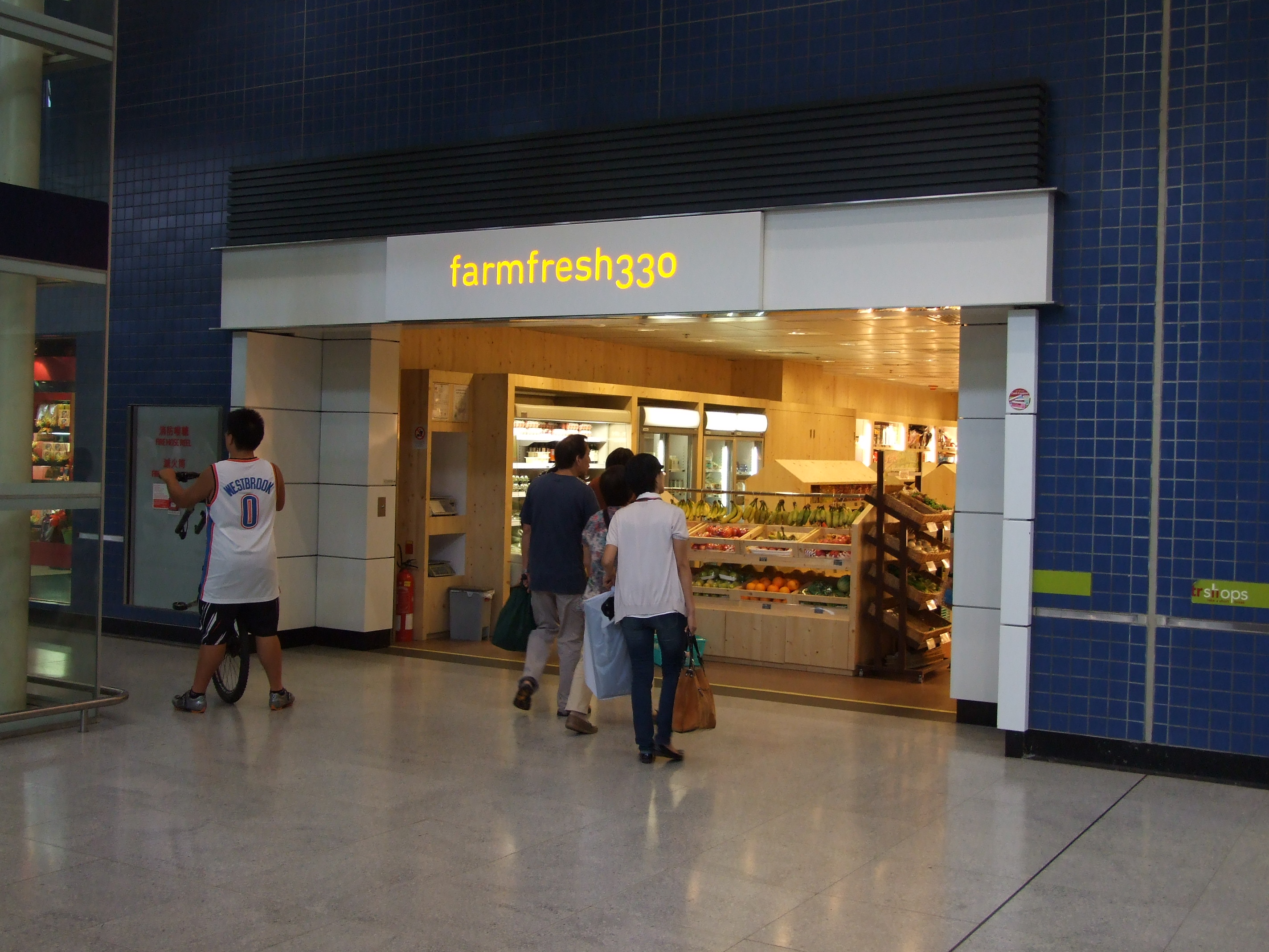 中文（香港）: 新生精神康復會農社330大圍店